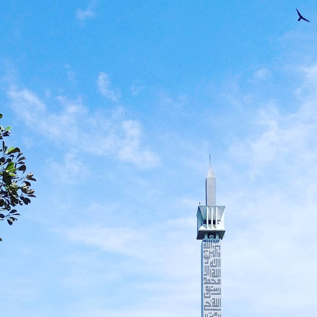 Menara di masjid Bahrul Alam Puspitek LIPI